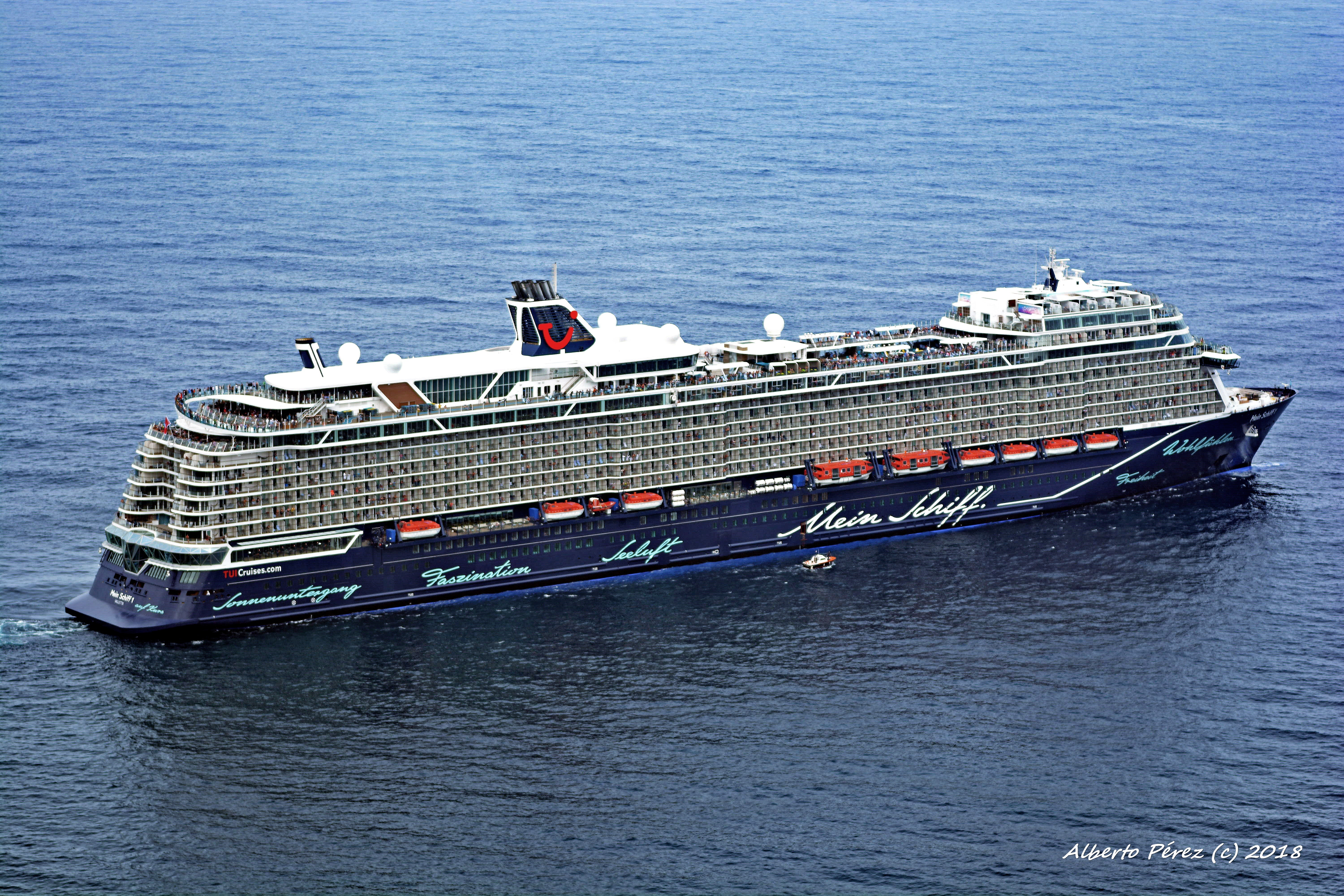 „Mein Schiff 1“ von TUI Cruises (2018) bei Santa Cruz de La Palma, Kanarische Inseln